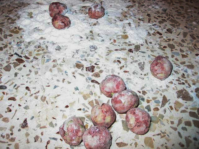 М'ясні фрикадельки: кульки з меленого м'яса та зелені